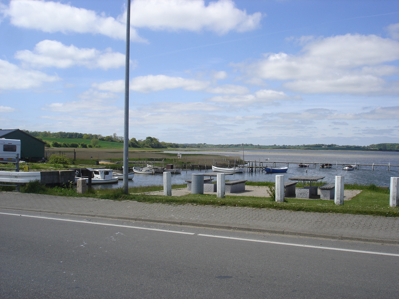 Hejlsminde, slusen ind mod noret - tv. grænsesten nr. 127